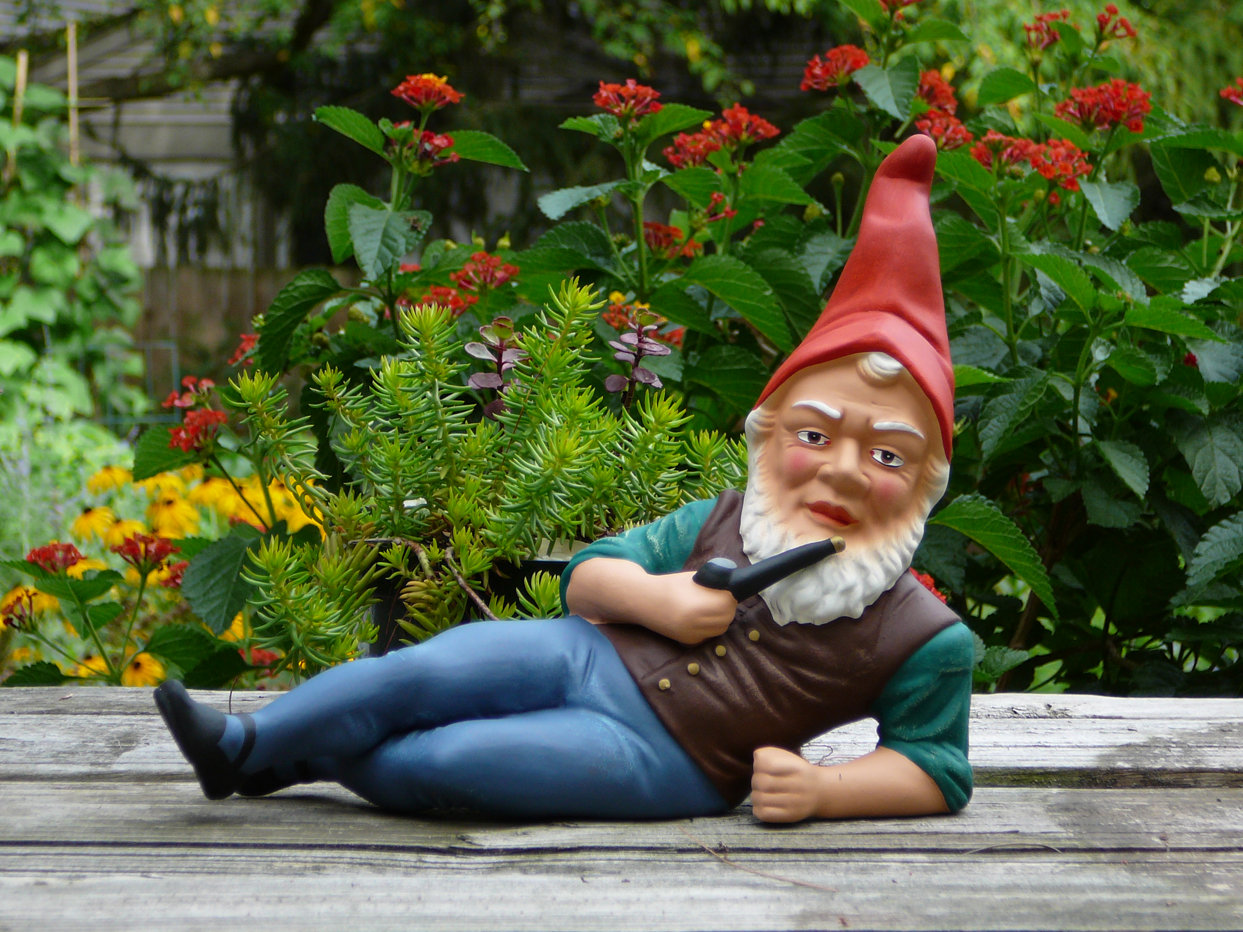 German garden gnome